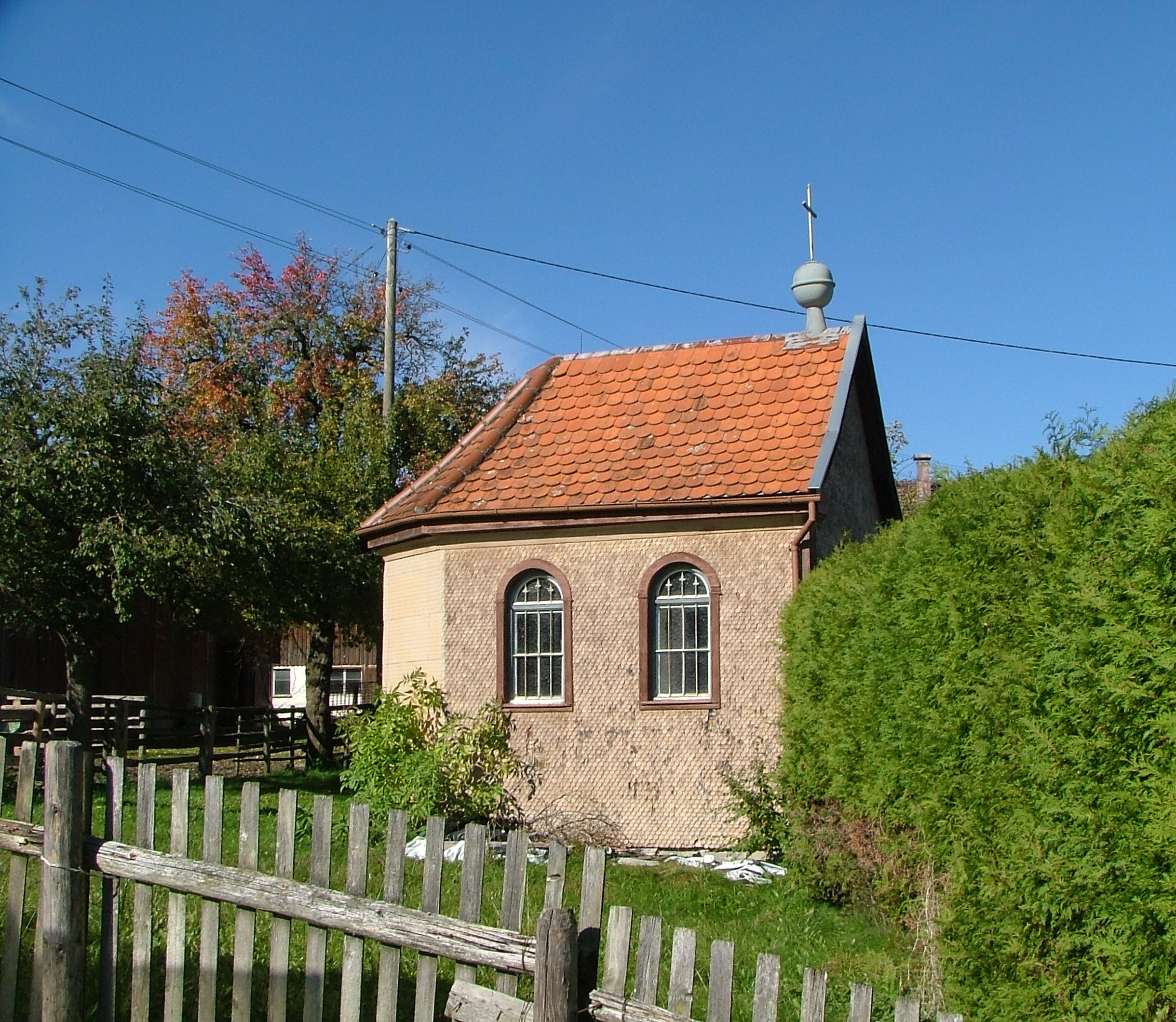 Jugendstilelemente